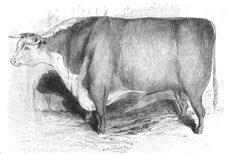 Hereford-Bulle des Herrn Jeffries, 3 Jahre 8 Monate alt; 30 Pfd. Sterl. Preis.